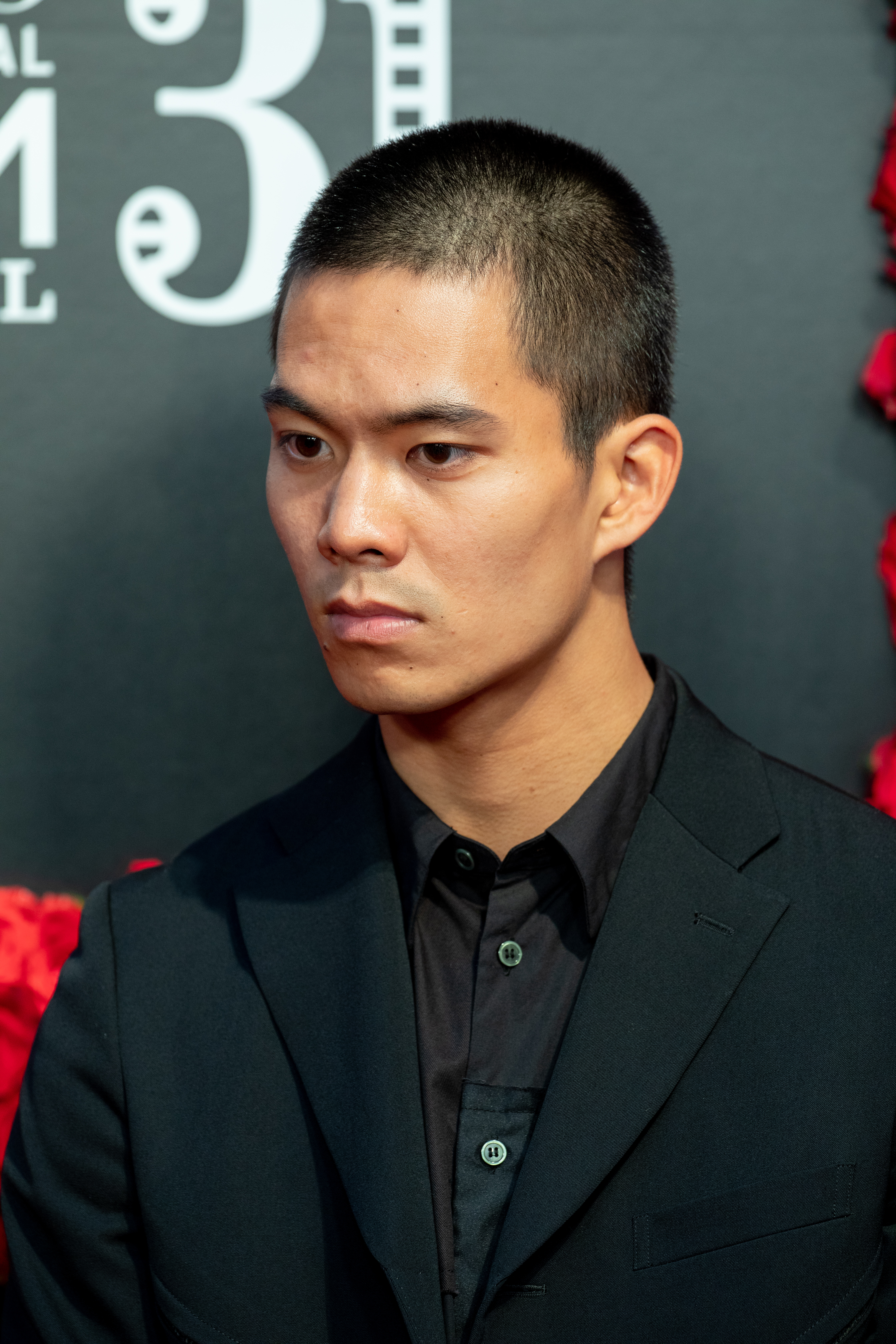 第30回 東京国際映画祭 オープニングセレモニー 菅原健 (ギャングース)